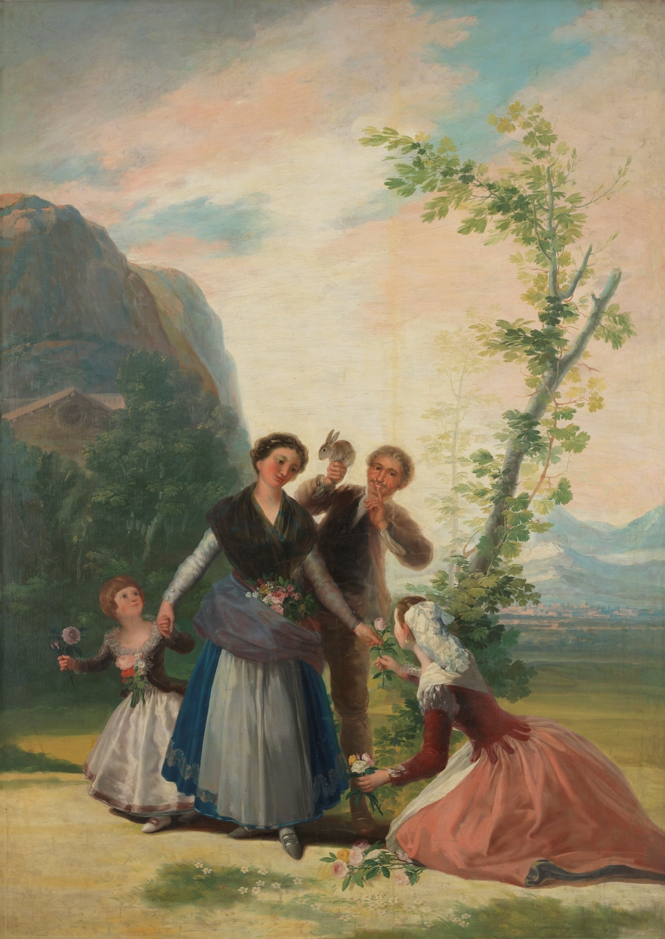 Cartones para tapices.